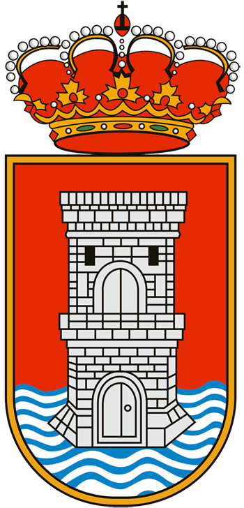 Torrelaguna (Madrid) shield